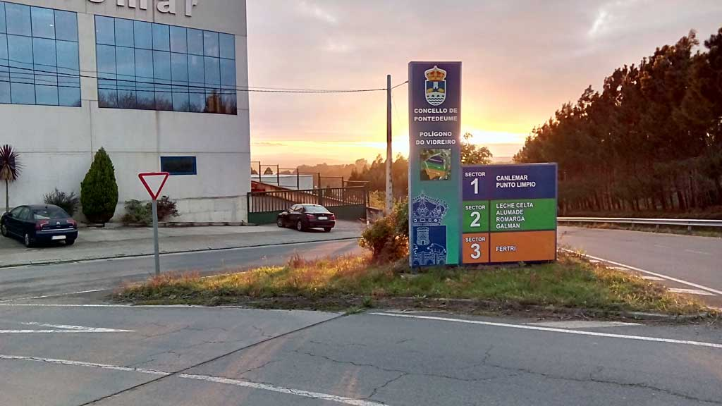 Vista dos accesos ao Vidreiro, Pontedeume.